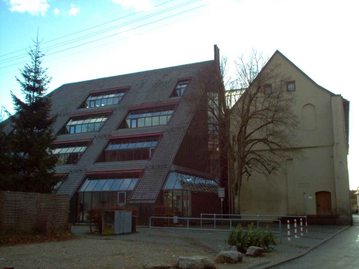 Mengen Gymnasium (früher Kloster)